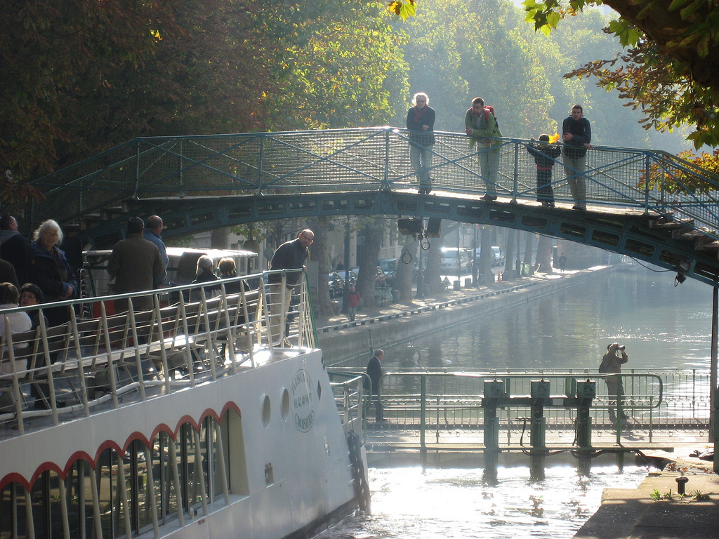 Passerelle de la Grange-aux-Belles, Canal Saint-Martin à Paris.